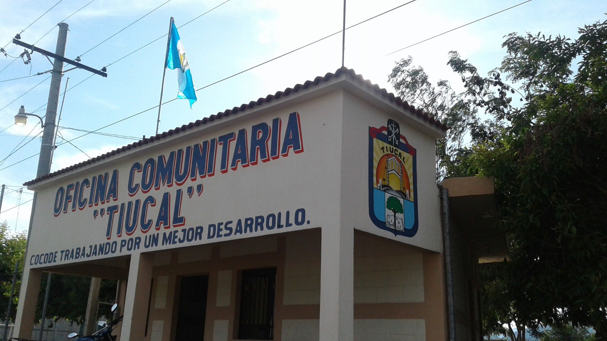 OFICINA DEL GOBIERNO